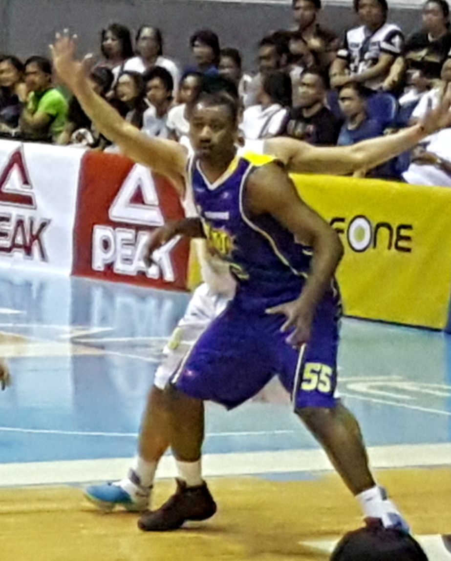 PBA - TNT vs ROS - David Simon - TNT - 2016-0321